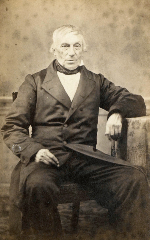 Vincent van Gogh (1789-1874), predikant gefotografeerd door Dirk le Grand